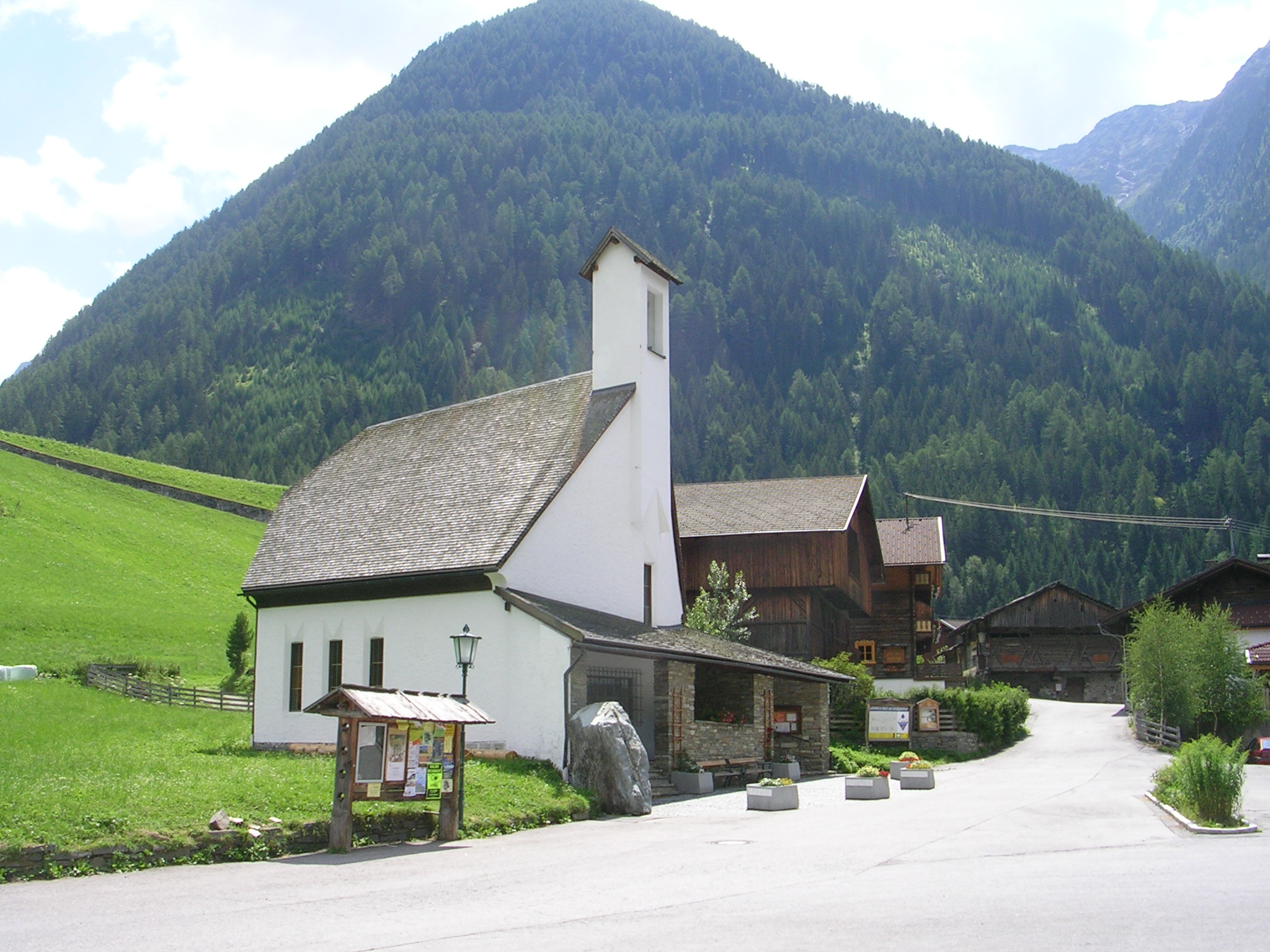 Kirche von Lesach (Fraktion der Gemeinde Kals am Großglockner).